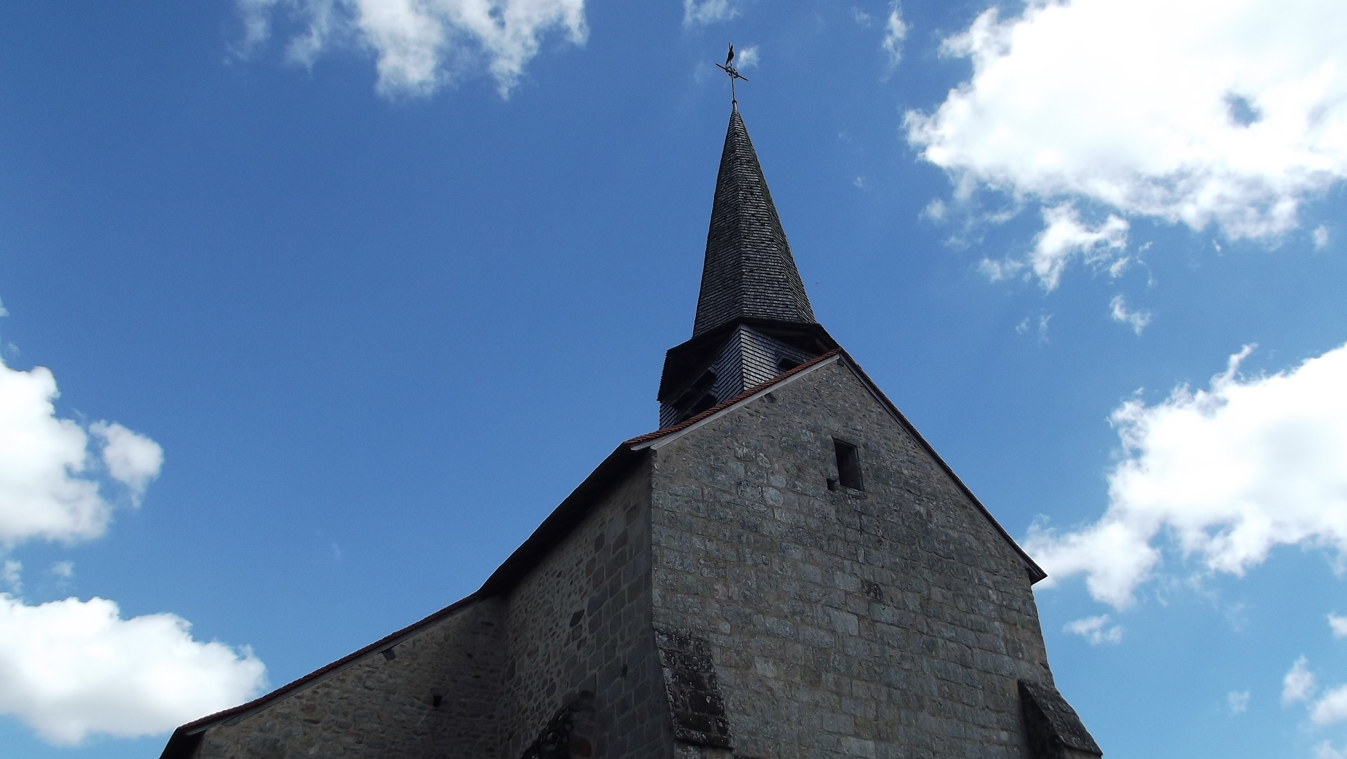 Eglise